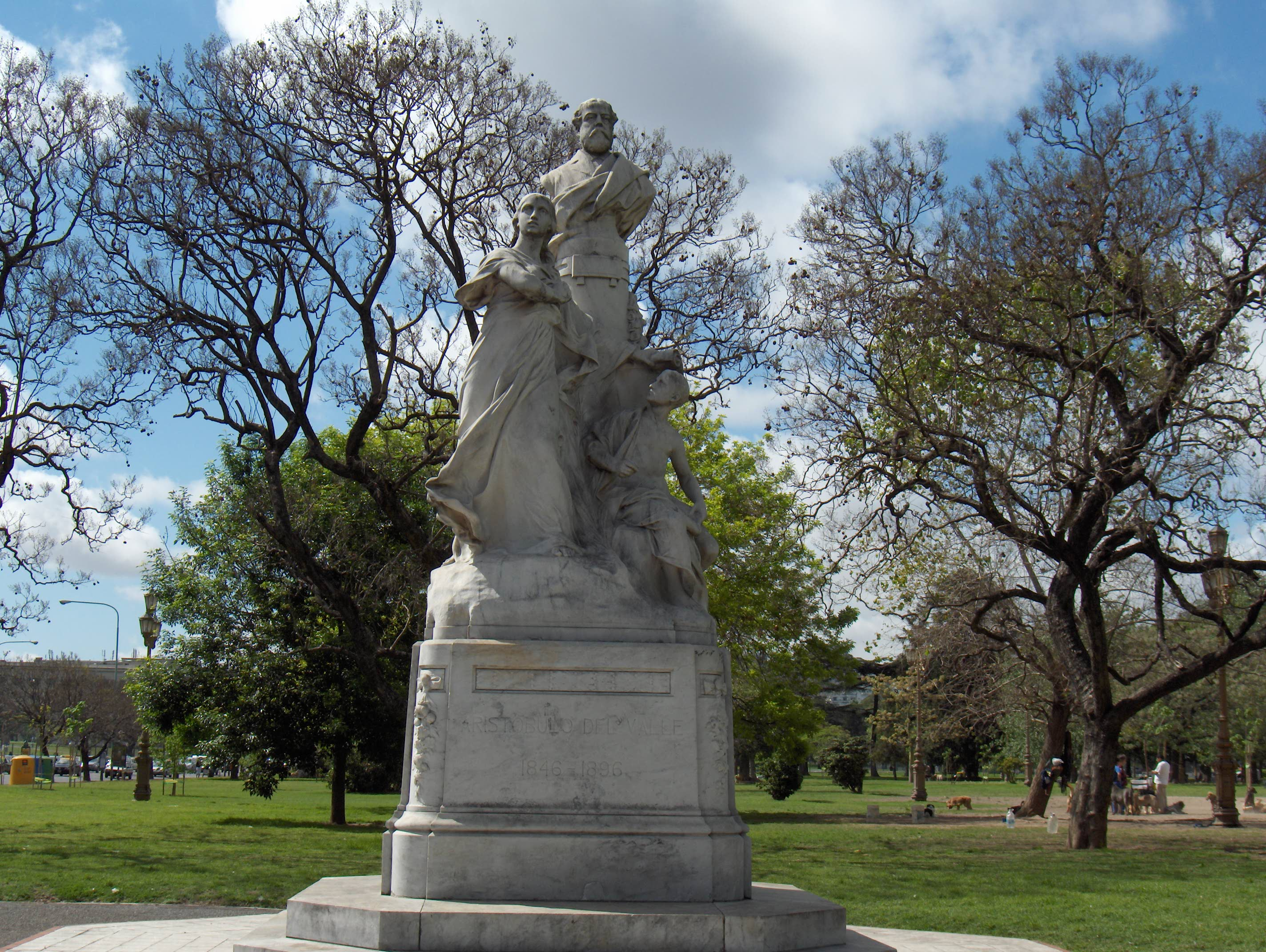 Monumento a Aristóbulo del Valle por el escultor Émile Peynot, en la Ciudad de Buenos Aires.